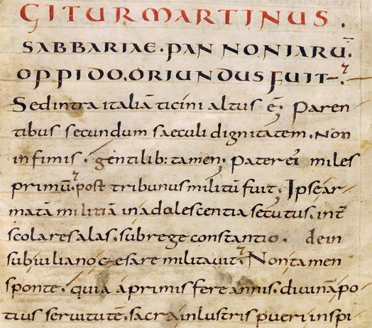 Page de la Vita Sancti Martini de Sulpice Sévère ; manuscrit composé en minuscule caroline.